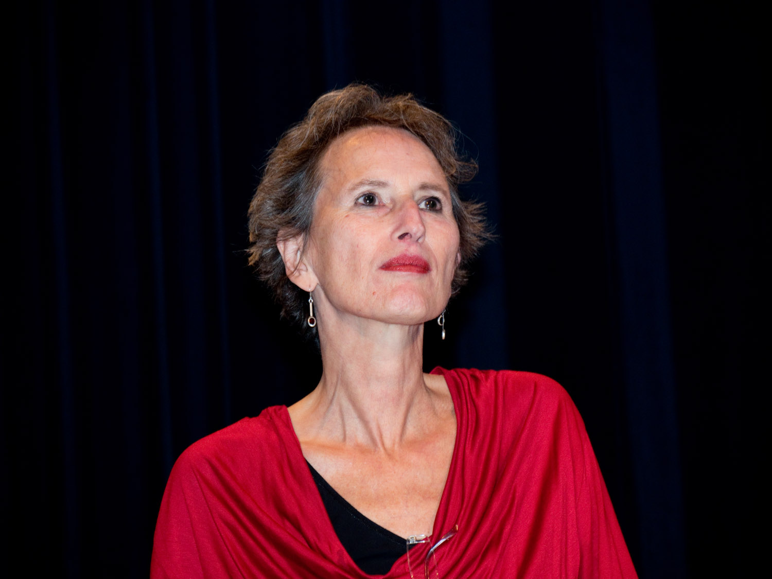 Karin Spaink spreekt een dankwoord na uitgeroepen te zijn tot Vrijdenker van het jaar 2015. Amsterdam, De Balie, 10 oktober 2015.